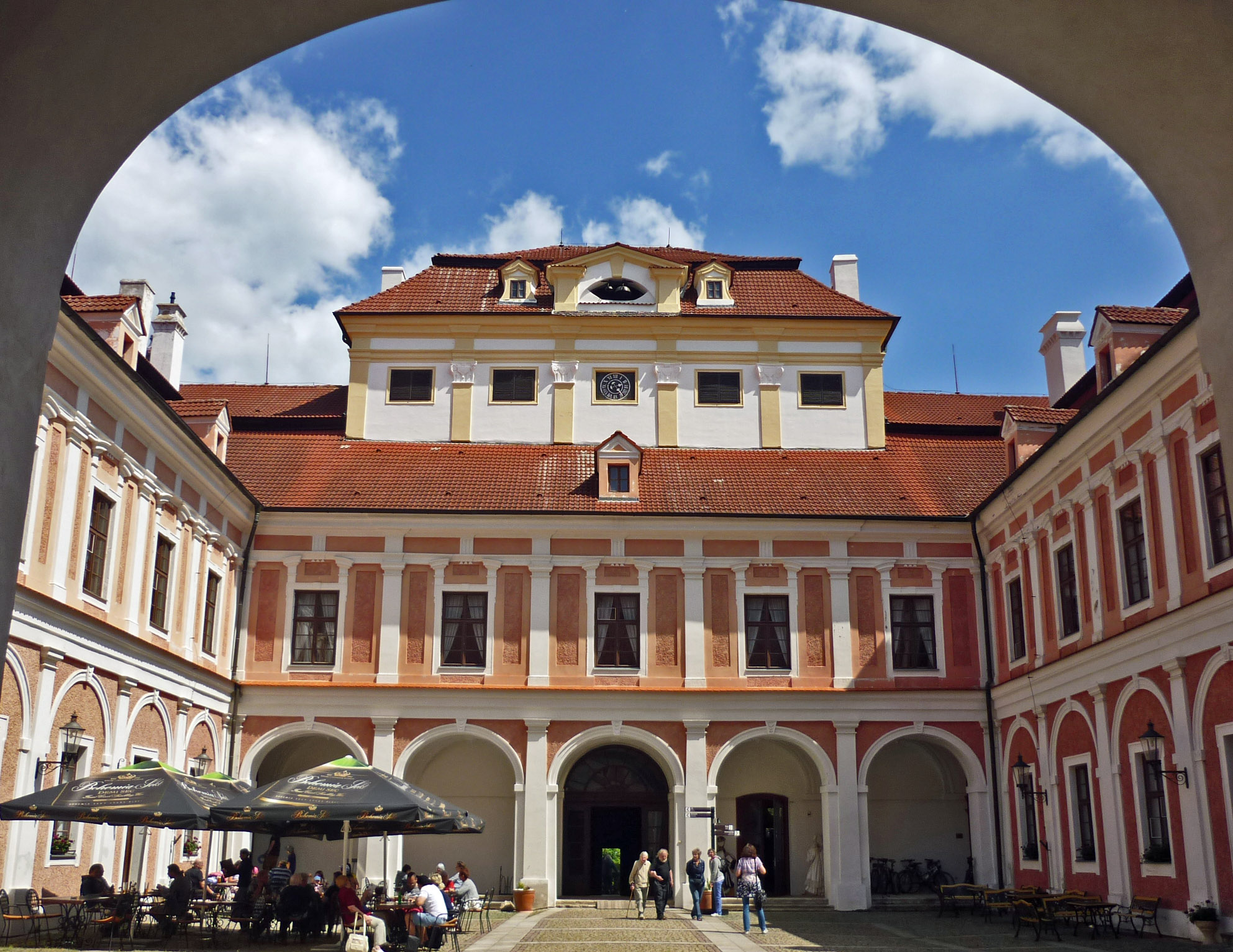 Schloss Rothenhaus bei Görkau in Nordböhmen (Červený Hrádek), Innenhof